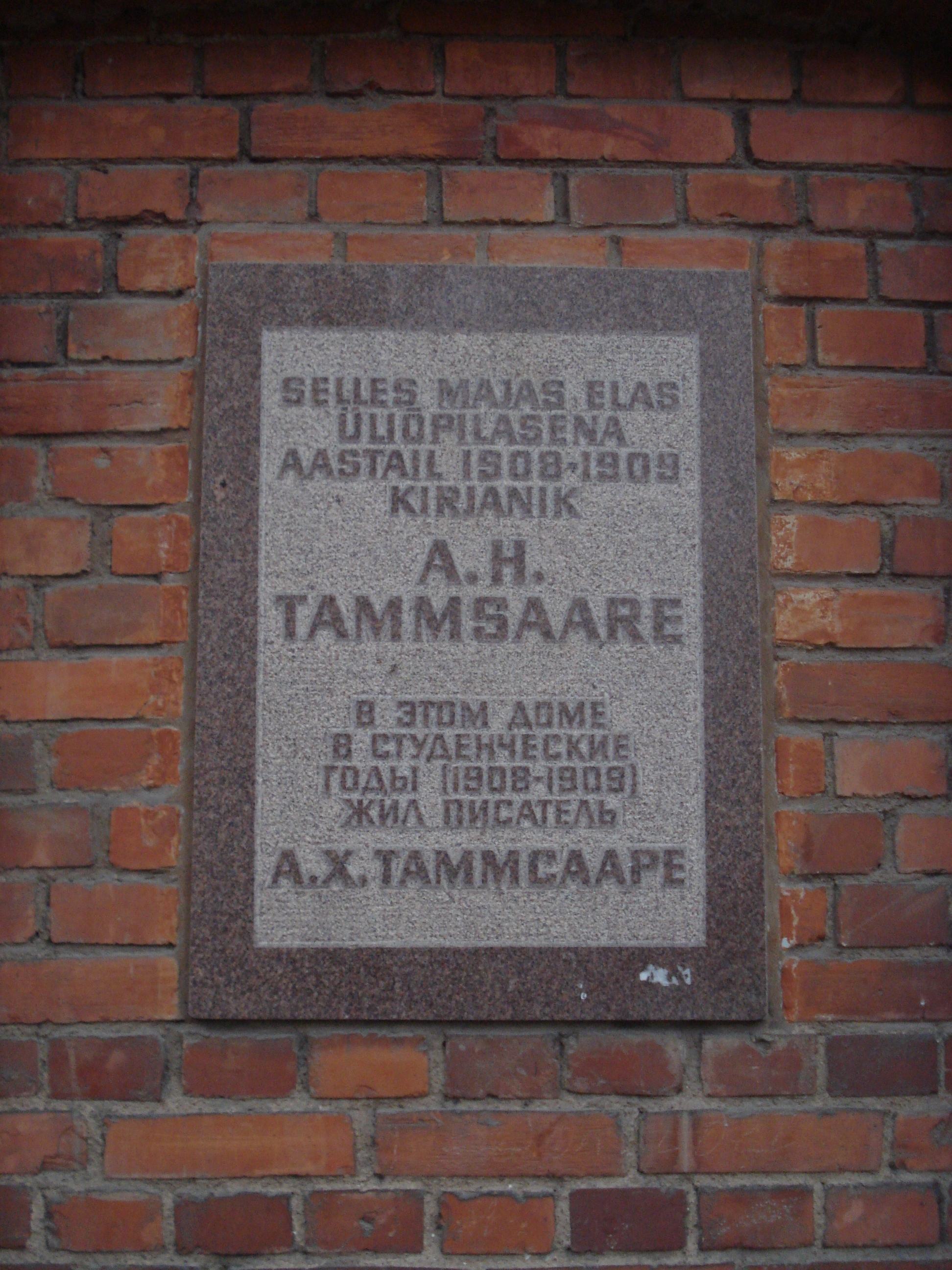 Anton Hansen Tammsaare memorial plaque in Tartu